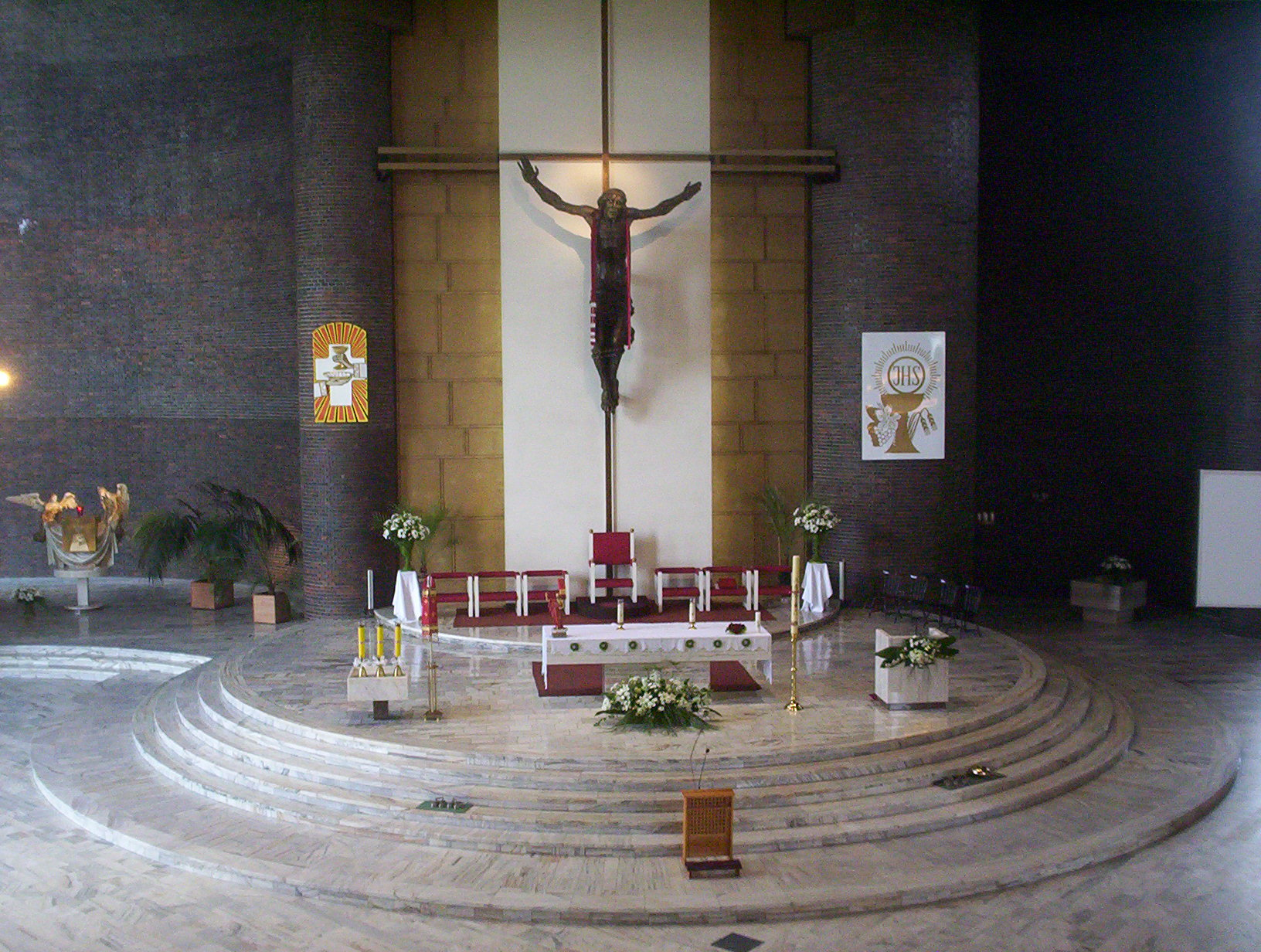 Kościół na Osiedlu Tysiąclecia w Katowicach, praca wlasna 2006